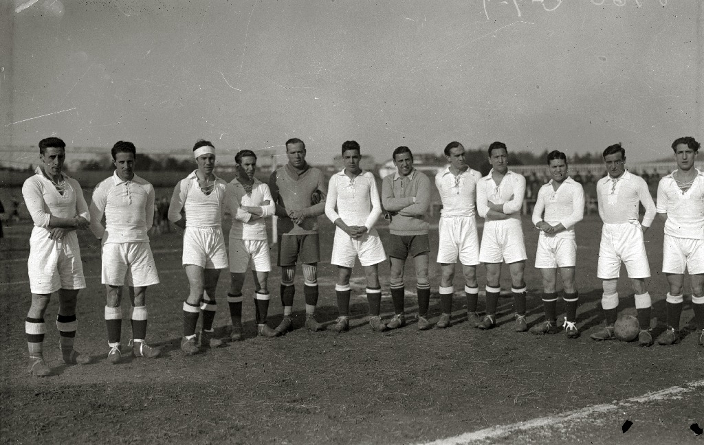 Título original: Partido entre el "Real Madrid C.F." y el "Athletic de Bilbao" en el Stadium Gal de Irun el año 1932. Saludo de capitanes y escenas del partido Localización: Irún (Guipúzcoa)